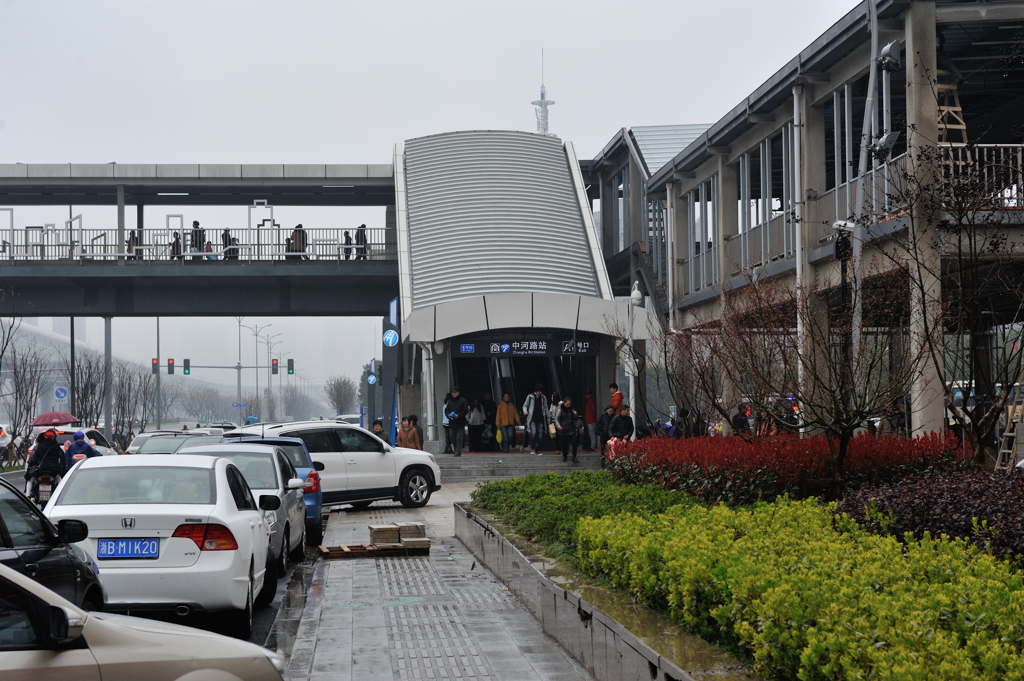 宁波地铁中河路站